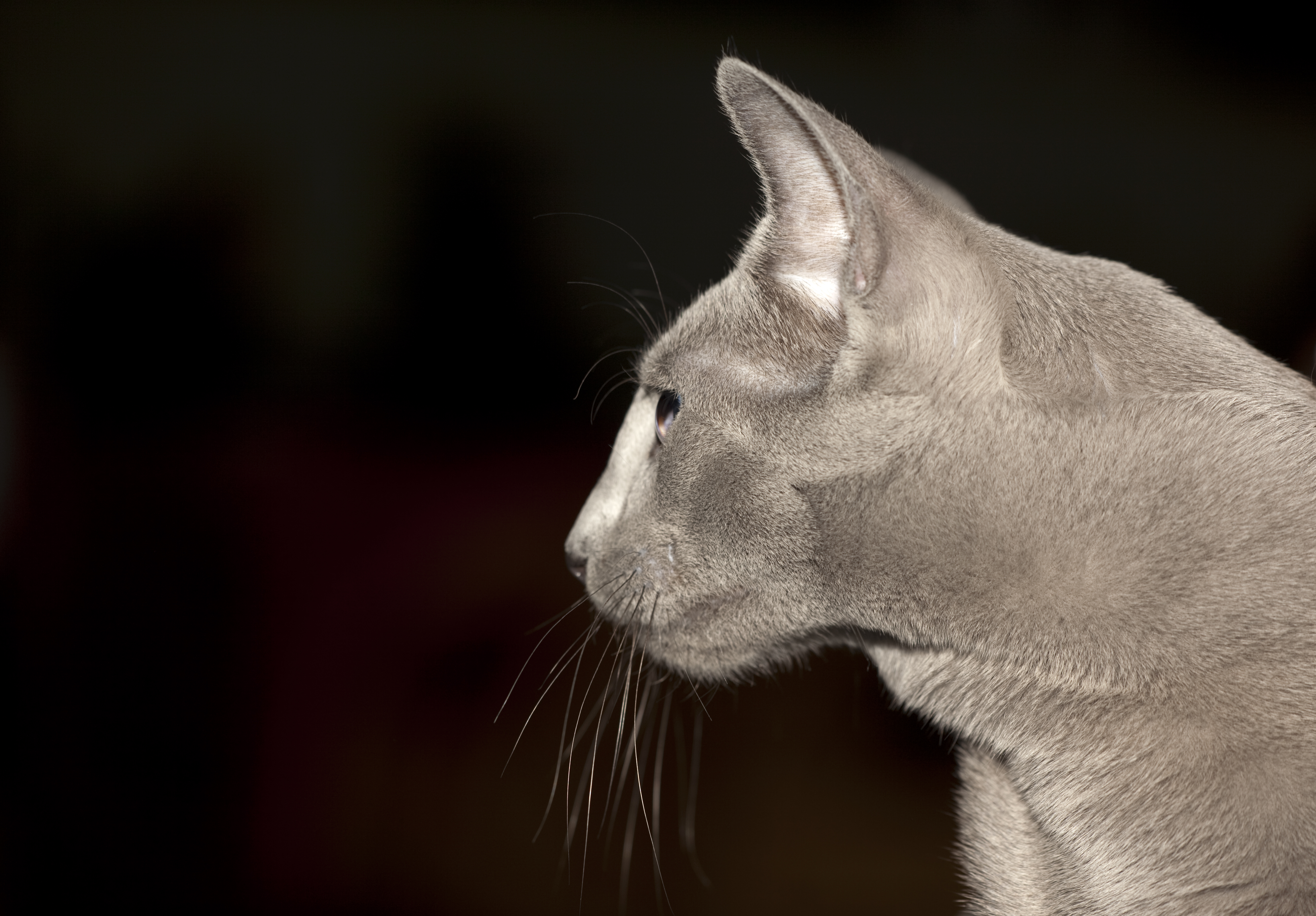 Русская голубая Flashpaw's Yesterdays Dreams, №841 по каталогу «Гран При Royal Canin-2009». Кот. Окрас: голубой (RUS a). Дата рождения: 11/11/2008. Владелец: Тамара Мартемьянова. Клуб «РосКош», Москва